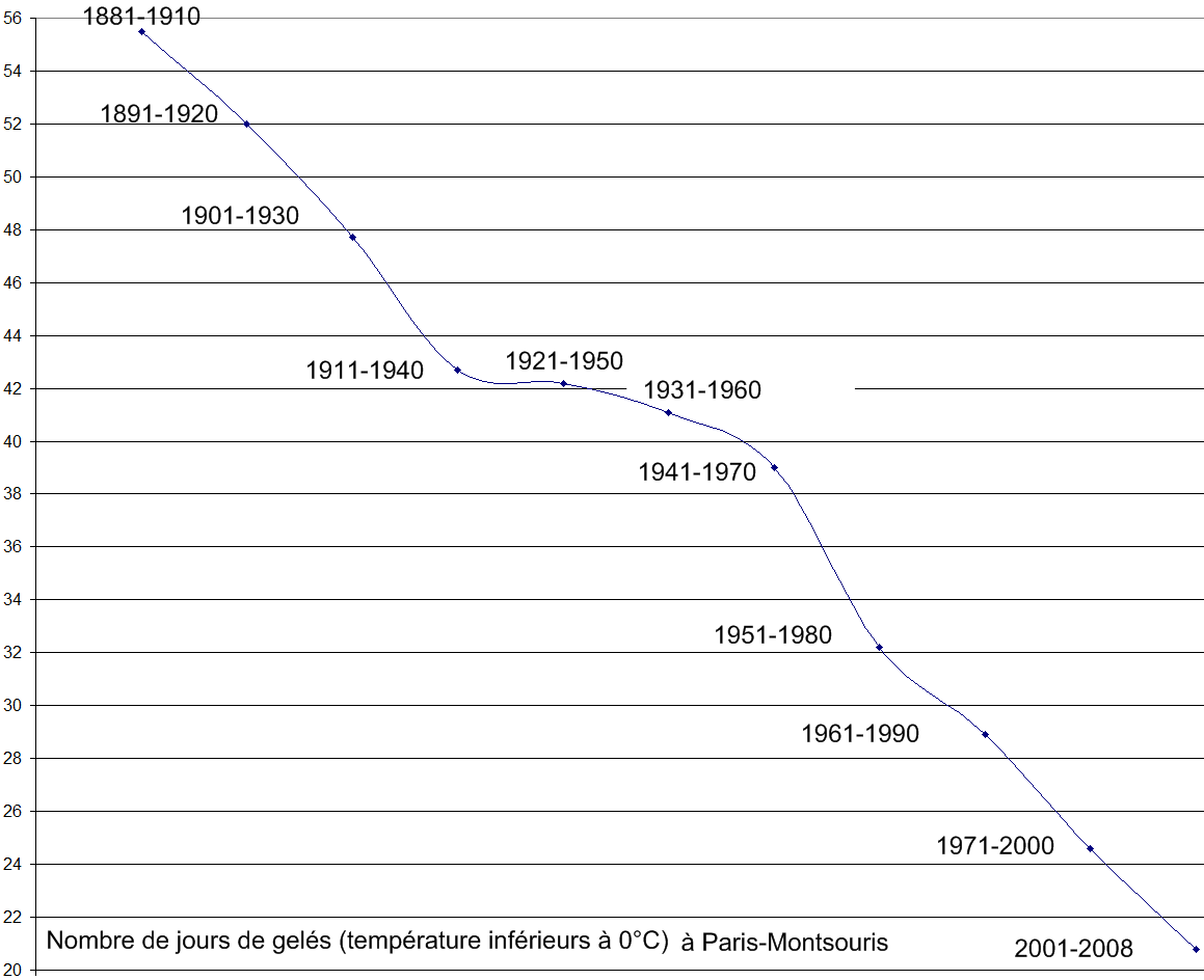 Nombre de jours de gelés à Paris-Montsouris. En moyenne sur la période 1881 - 1910, 56 températures minimales sont négatives par an. En moyenne de la période 1971 - 2000, 25 températures minimales sont négatives chaque année.